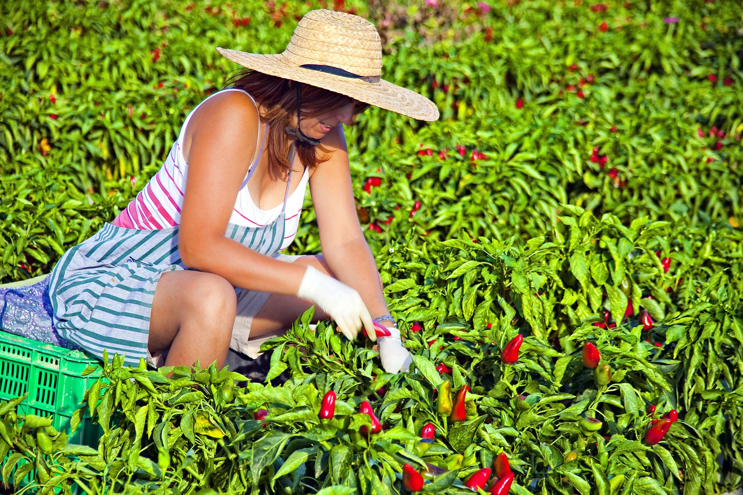 Recogida del pimiento Tap de Cortí